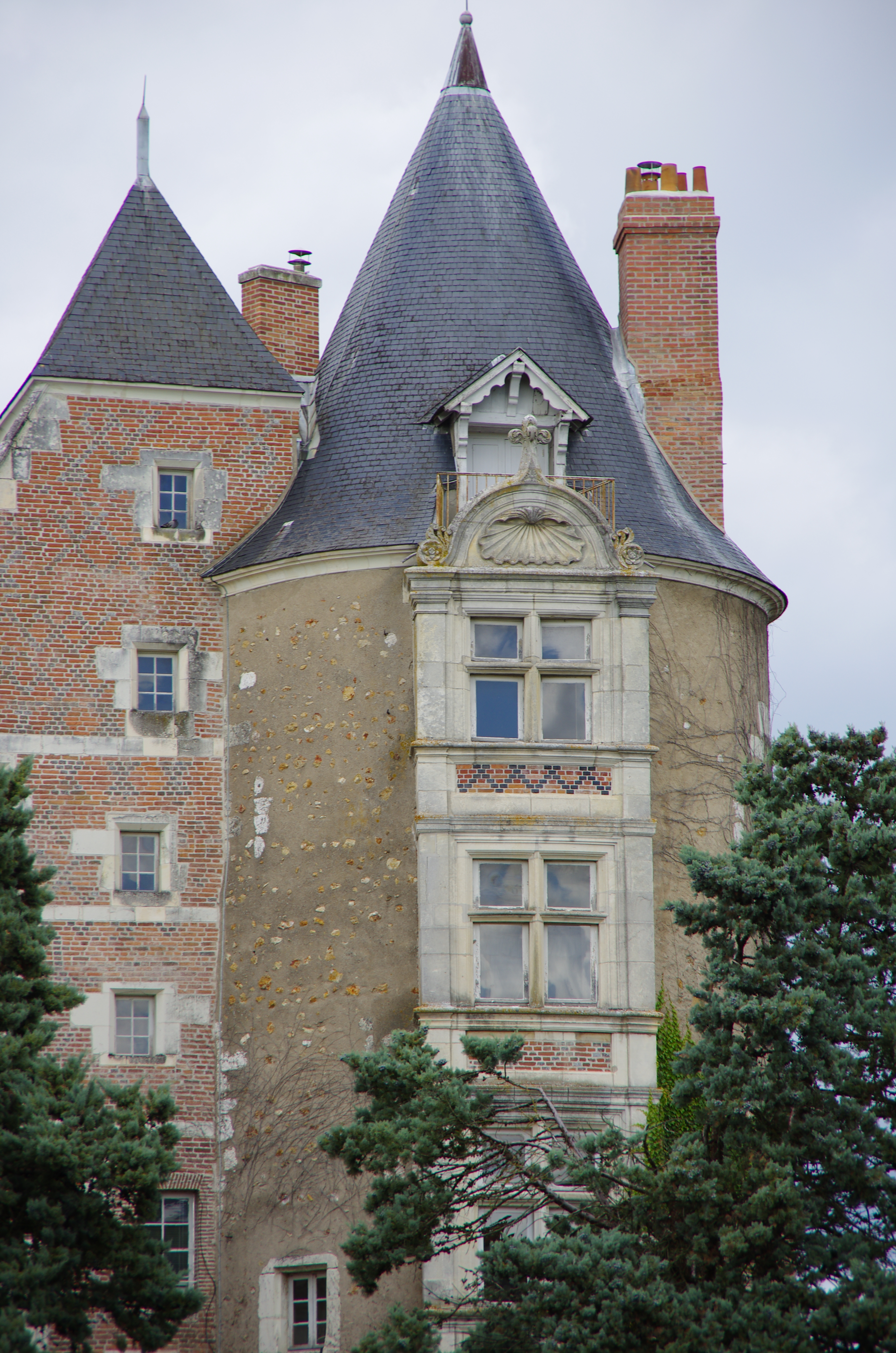 Château de Romorantin (Loir-et-Cher, France) .